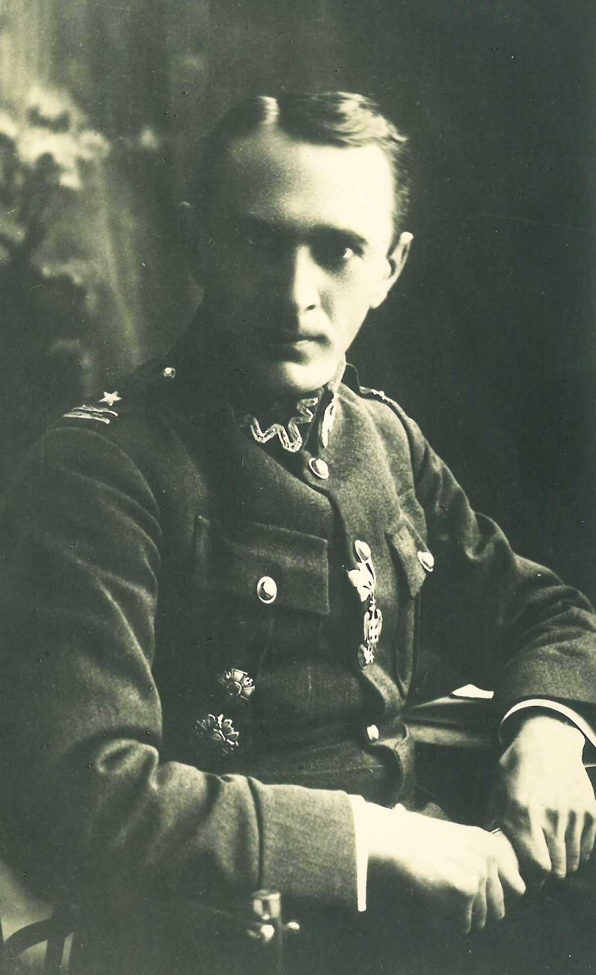 Ksiądz mjr Franciszek Łuszczki - Proboszcz 2 Dywizji Piechoty Legionów Polskich